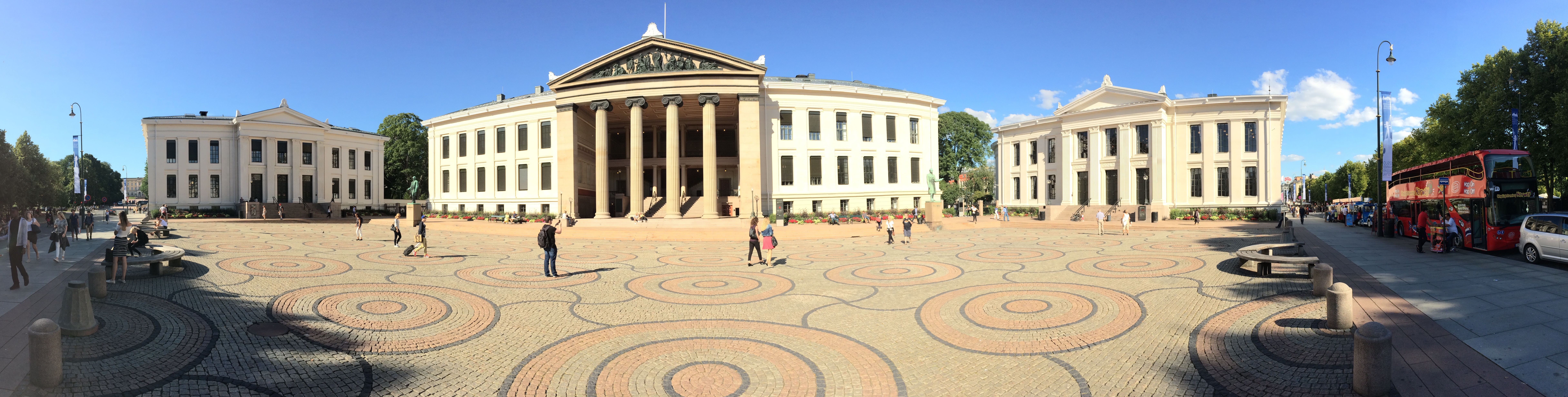 Forvridd (og litt fortettet og oppstykket) panoramafoto av Universitetsplassen og universitetsbygningene ved Karl Johans gate i Oslo sentrum 20. august 2015. Til venstre Domus Bibliotheca, i midten Domus Media (Midtbygningen) og til høyre Domus Academica (Urbygningen). Plassen ble brolagt i 1931. Stinius Fredriksens statue av P. A. Munch fra 1933 foran Domus Media. Universitetshagen mellom bygningene bak til høyre, Slottet i bakgrunnen til venstre.